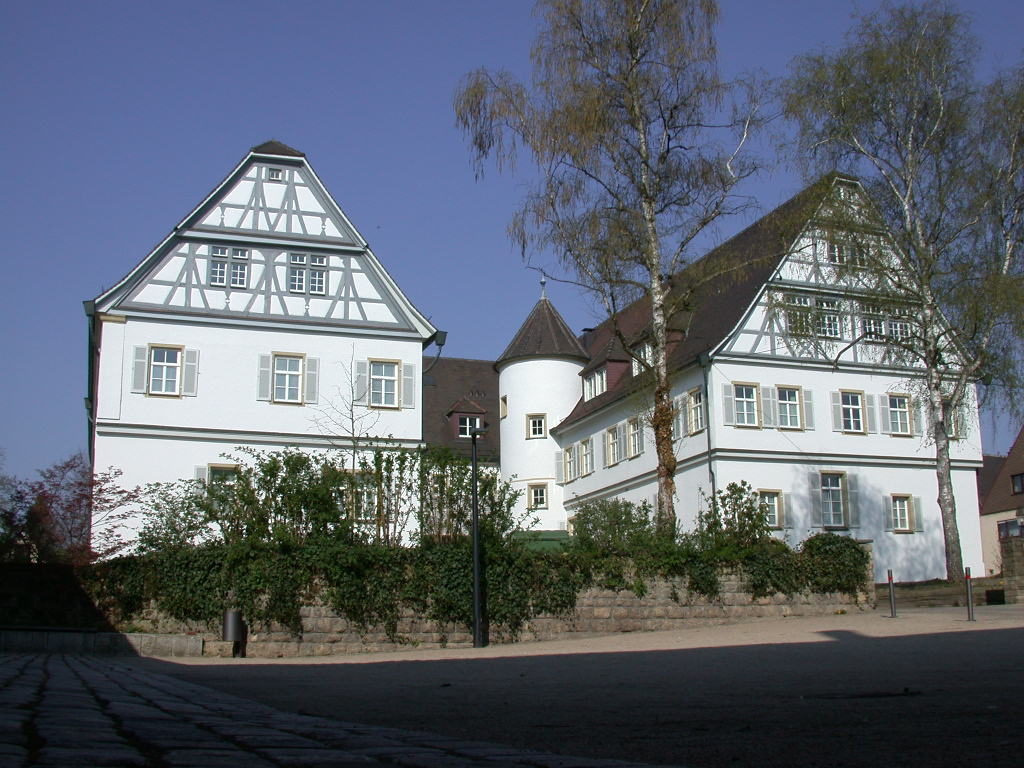 Stammheimer Schloss, ein besonderer Stolz von Stammheim, wurde 1579 von dem Renaissancebaumeister Heinrich Schickhardt erbaut. Das Schloss war sein Erstlingswerk. Seine mannigfaltigen Aktivitäten als Architekt, Stadtplaner, Ingenieur und Kartograf hat Schickhardt selbst in seinem 1630 bis 1632 verfassten „Inventarium“ dokumentiert. Sie haben ihm den Ehrennamen eines „schwäbischen Leonardo“ eingebracht. Heute befindet sich im Schloss ein Altenwohnheim der Evangelischen Altenheimat.